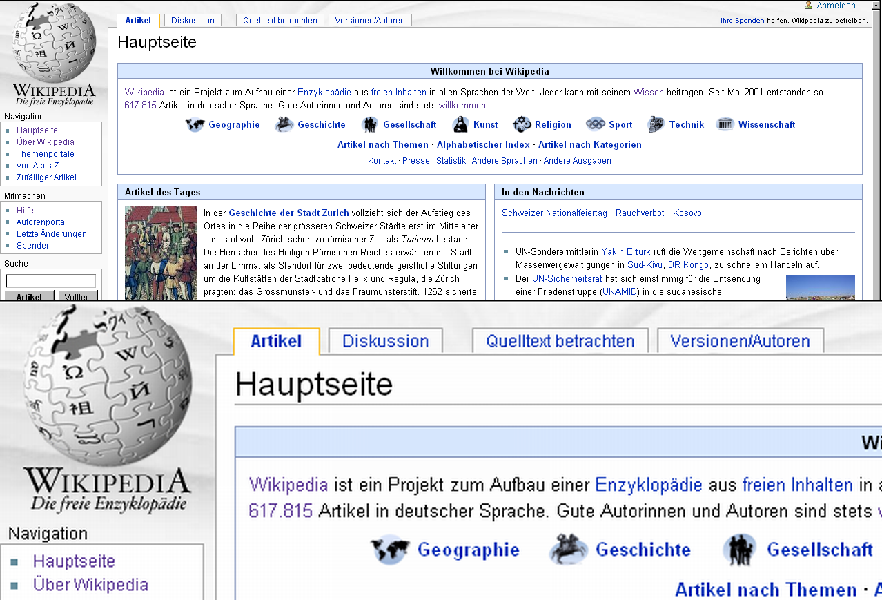 Deutschsprachige Wikipedia-Startseite mit Bildschirmlupe in unterer Bildschirmhälfte